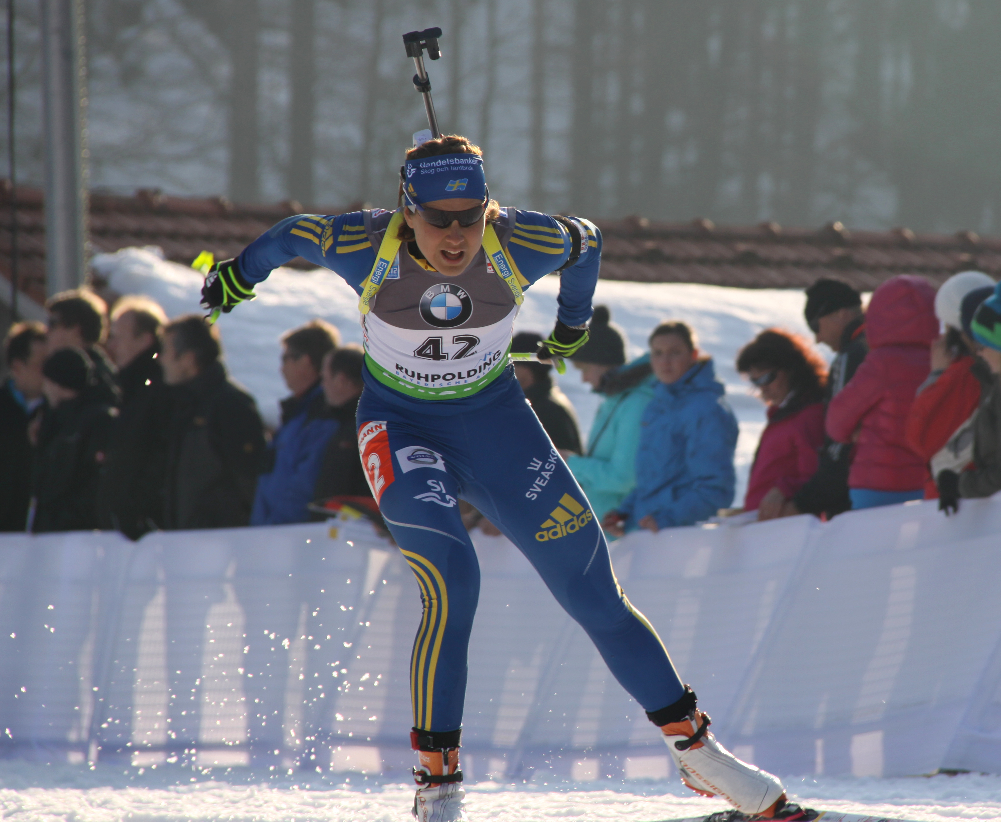 IMG 7892 42 Anna-Karin Strömstedt SWE - Ruhpolding 2012